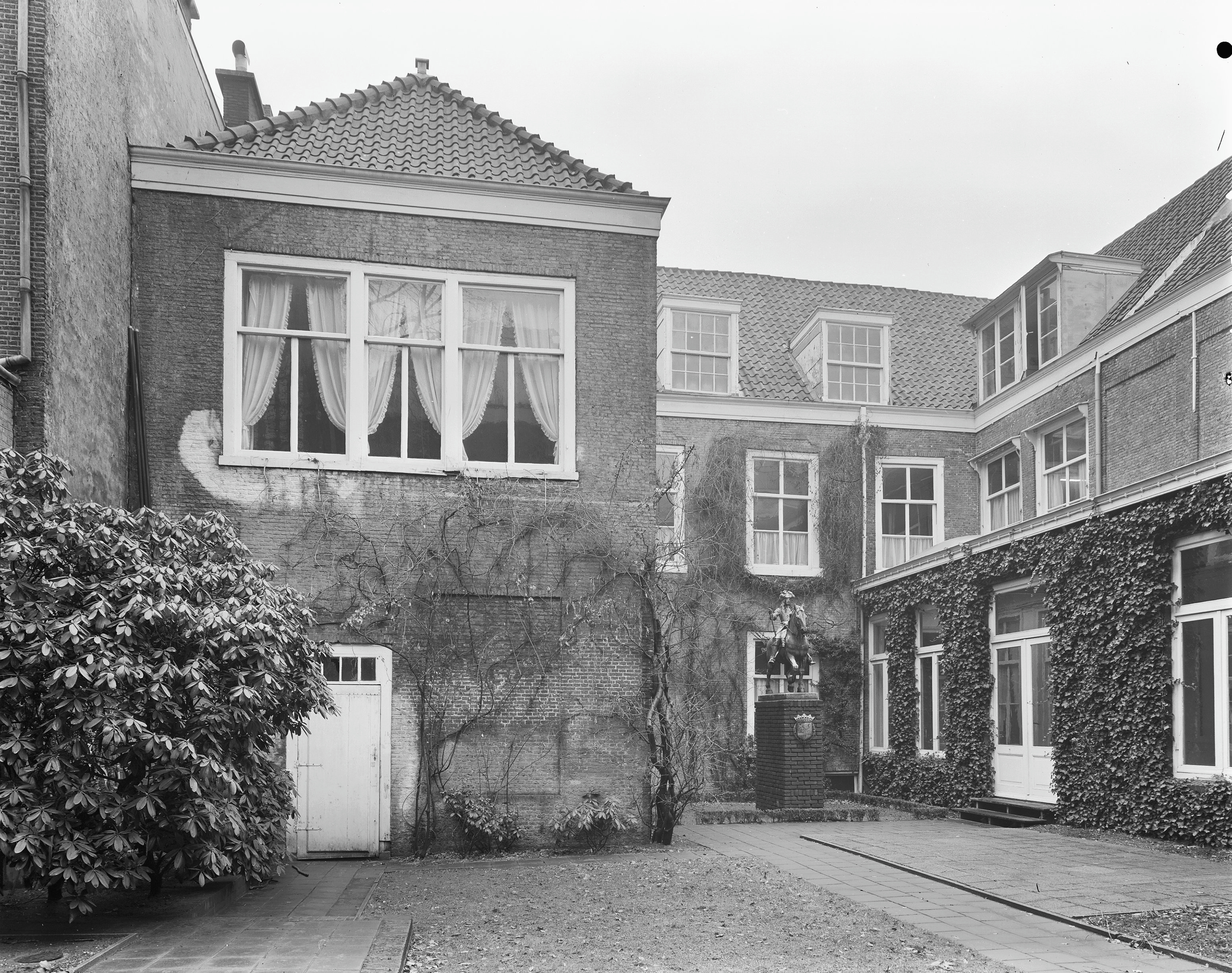 gevelsbinnenplaats